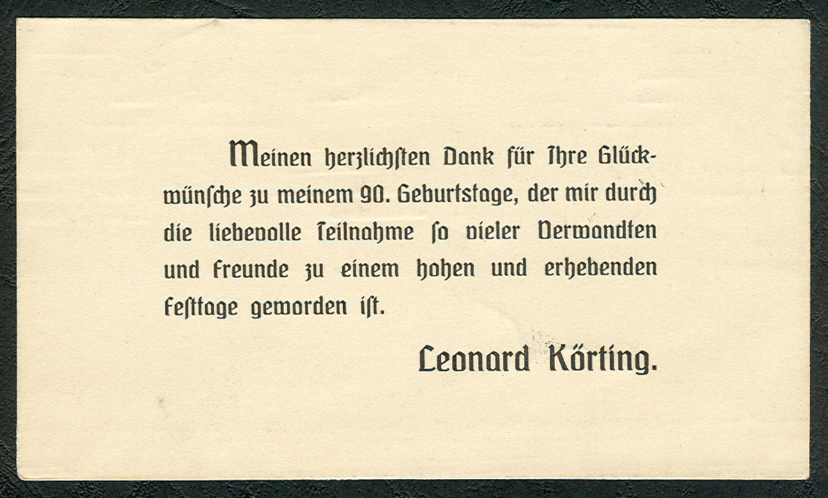 „Meinen herzlichen Dank für Ihre Glückwünsche zum 90. Geburtstage, der mir durch die liebevolle Teilnahme so vieler Verwandten (Verwandter) und Freunde zu einem hohen und erhebenden Festtage geworden ist. Leonard Körting.“